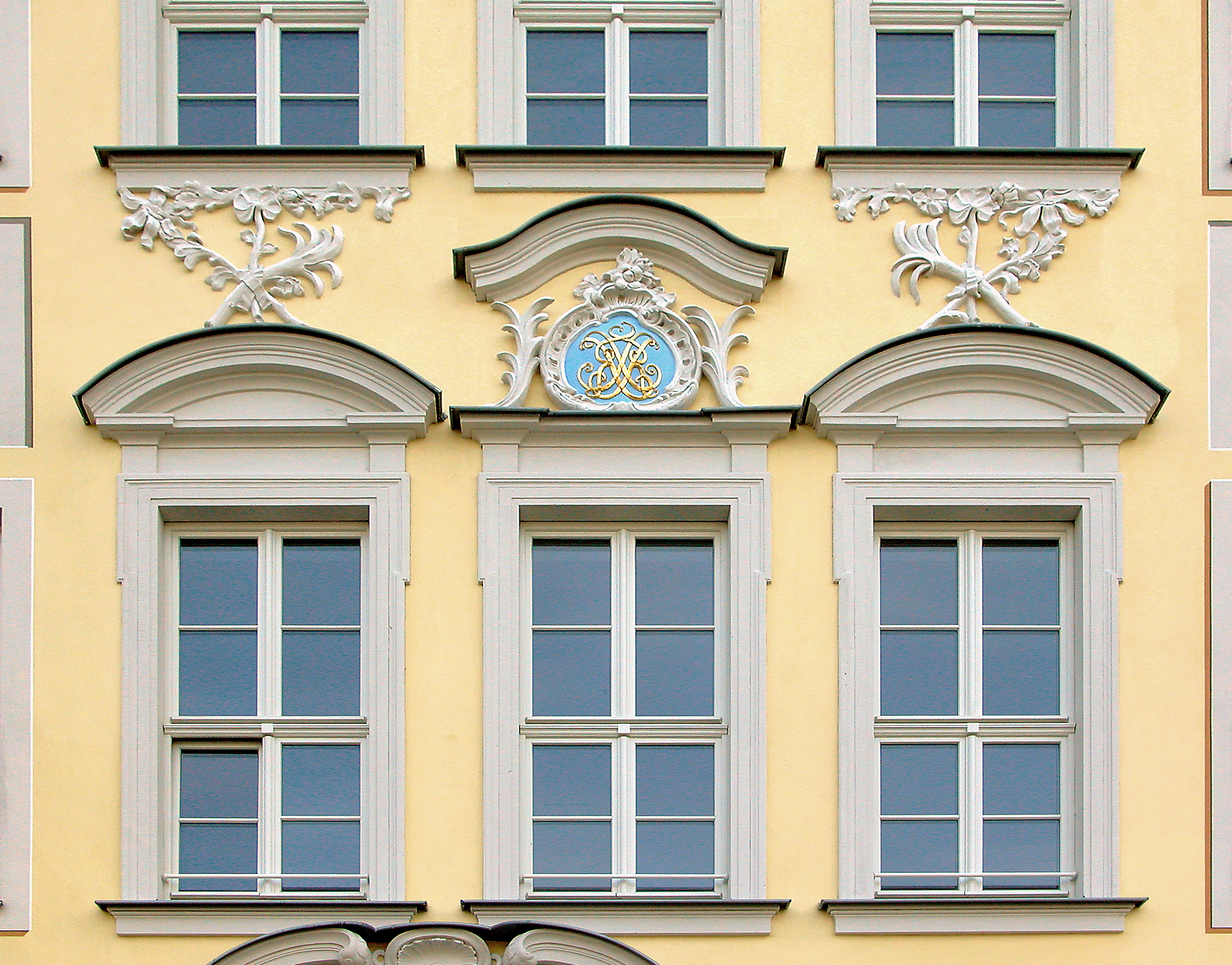 31.10.2008 01067 Dresden-Altstadt, Neumarktgebiet: Das "Köhlersche Haus", Haus d. Weinhändlers Johann Köhler (1747-1749; wieder aufgebaut 2008), Frauenstraße 14. Heute Teil der Heinrich-Schütz-Residenz. Fassade im 1. OG. [DSCN35177.TIF]20081031080DR.JPG(c)Blobelt